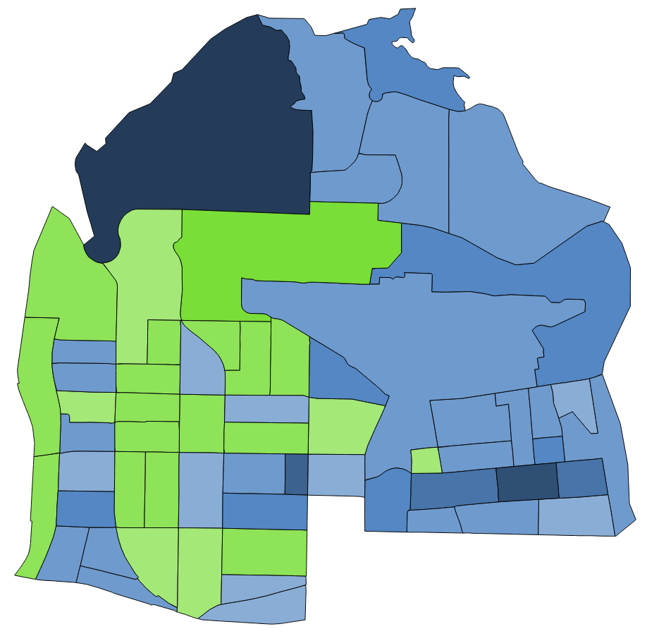 顏色對照表